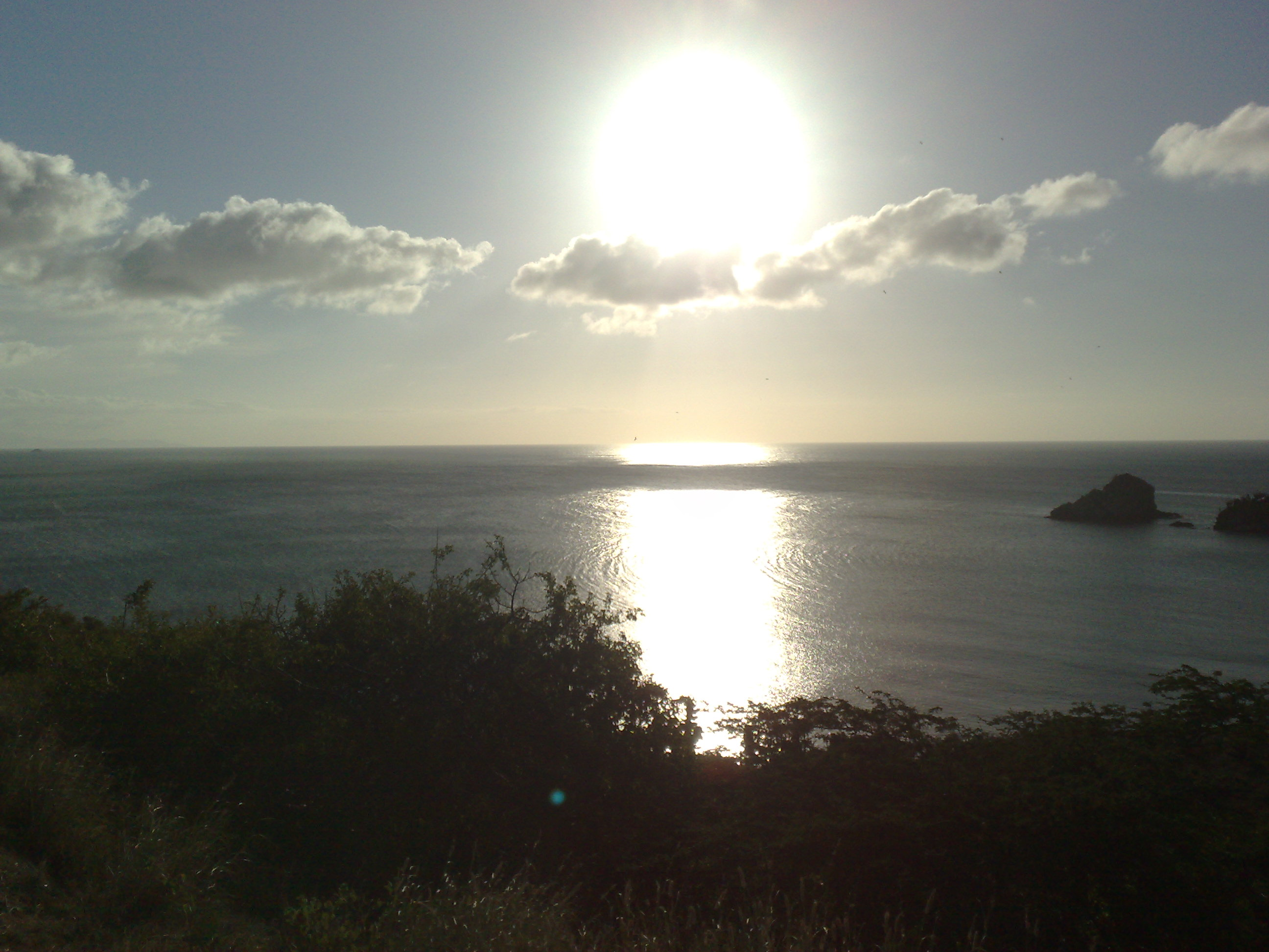 Vista desde el Mirador de Constanza, Isla de Margarita.